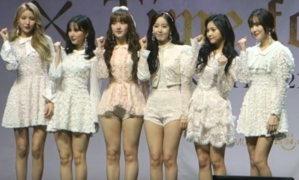 14일 오후 서울시 광진구 광장동 '예스24 라이브홀'에서 두번째 정규앨범 'Time for us(타임 포 어스)' 발매 쇼케이스가 열려 여자친구가 포토타임을 갖고 있다.